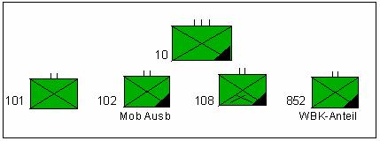 Gliederung des Jägerregiments 10 „Linzgau“ der Bundeswehr. Nur das Jägerbataillon 110 war aktiv. Das Bataillon 108 war ein Sicherungsbataillon.